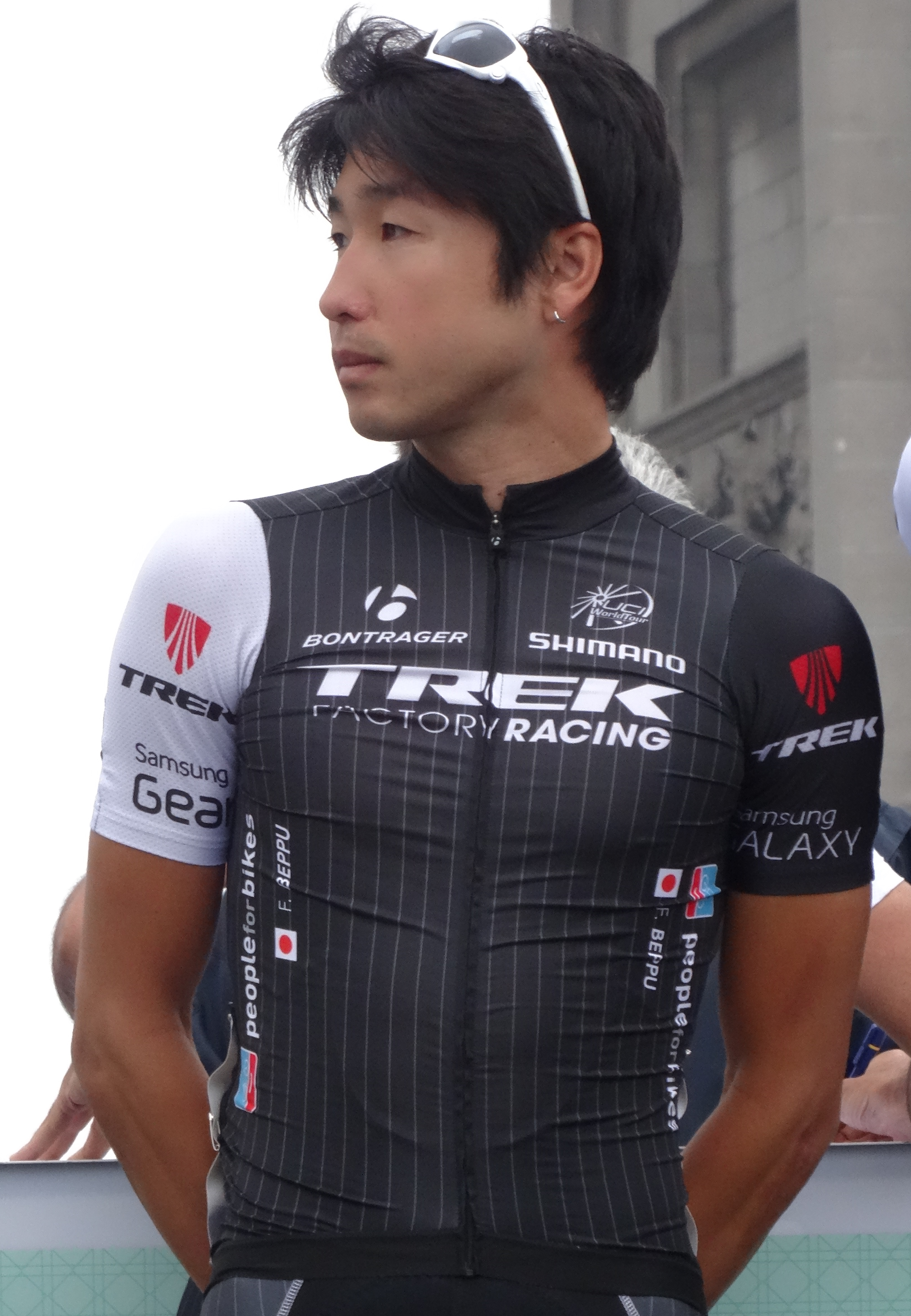 Brussels Cycling Classic 2014.